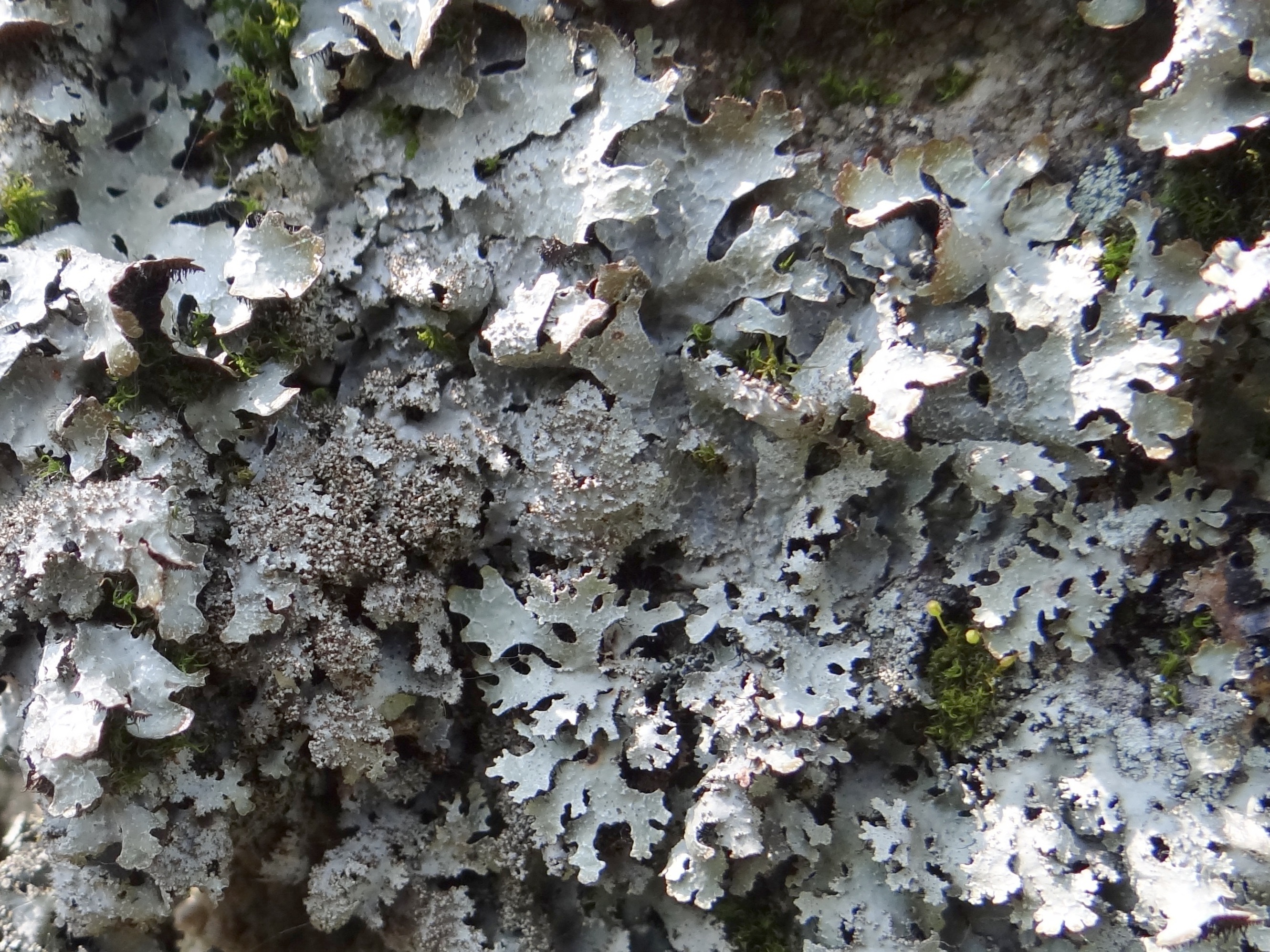 Parmelia saxatilis (miejsce: Kamienie Brodzińskiego, Pogórze Wiśnickie)